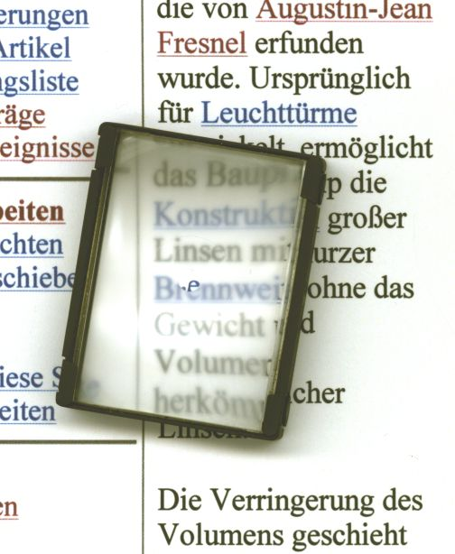 Andere Seite der Mattschebe Titel: Matte Seite der Einstellscheibe einer Spiegelreflexkamera (Original text: Wie Fresnellinse.jpg (siehe Thumb), nur die andere Seite der Mattscheibe) (EN:)Focusing screen Fotograf: Arne List